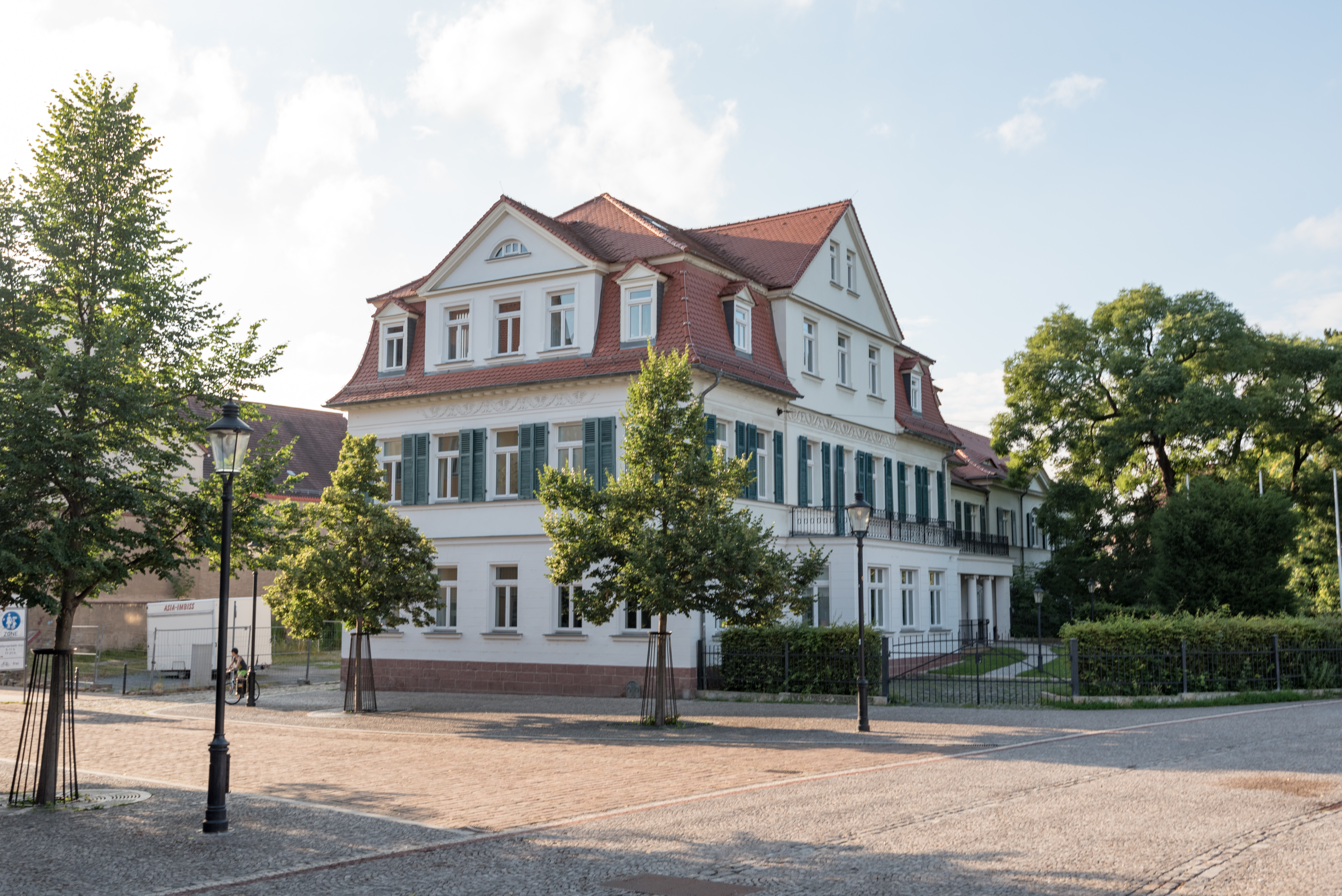 Naumburg (Saale), Curt-Becker-Platz 6